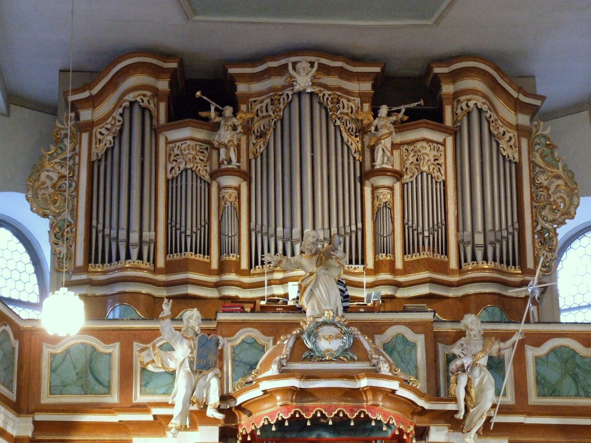 Orgel der Hospitalkirche in Wetzlar